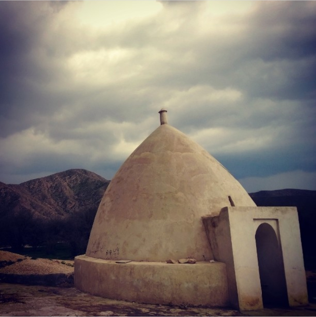 این آب‌انبار در دشت مهروزی(واقع در قلات) ساخته شده.